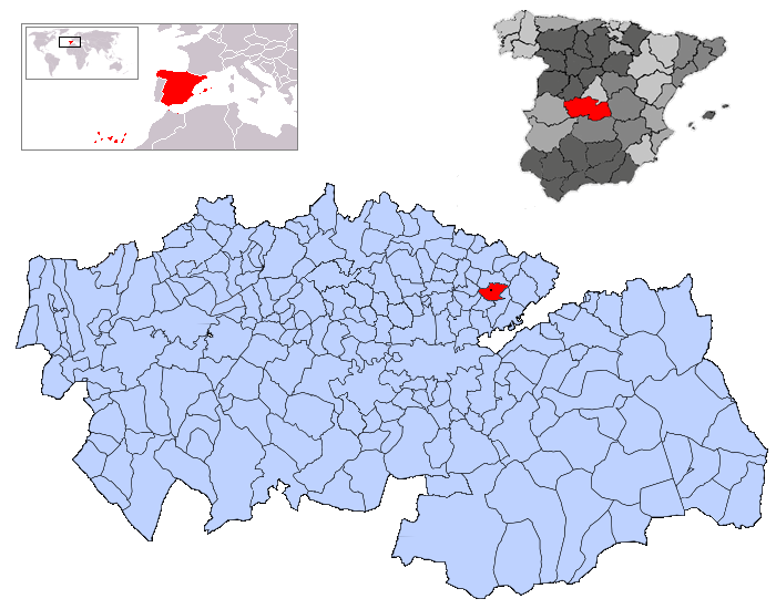 Pantoja en la provincia de Toledo